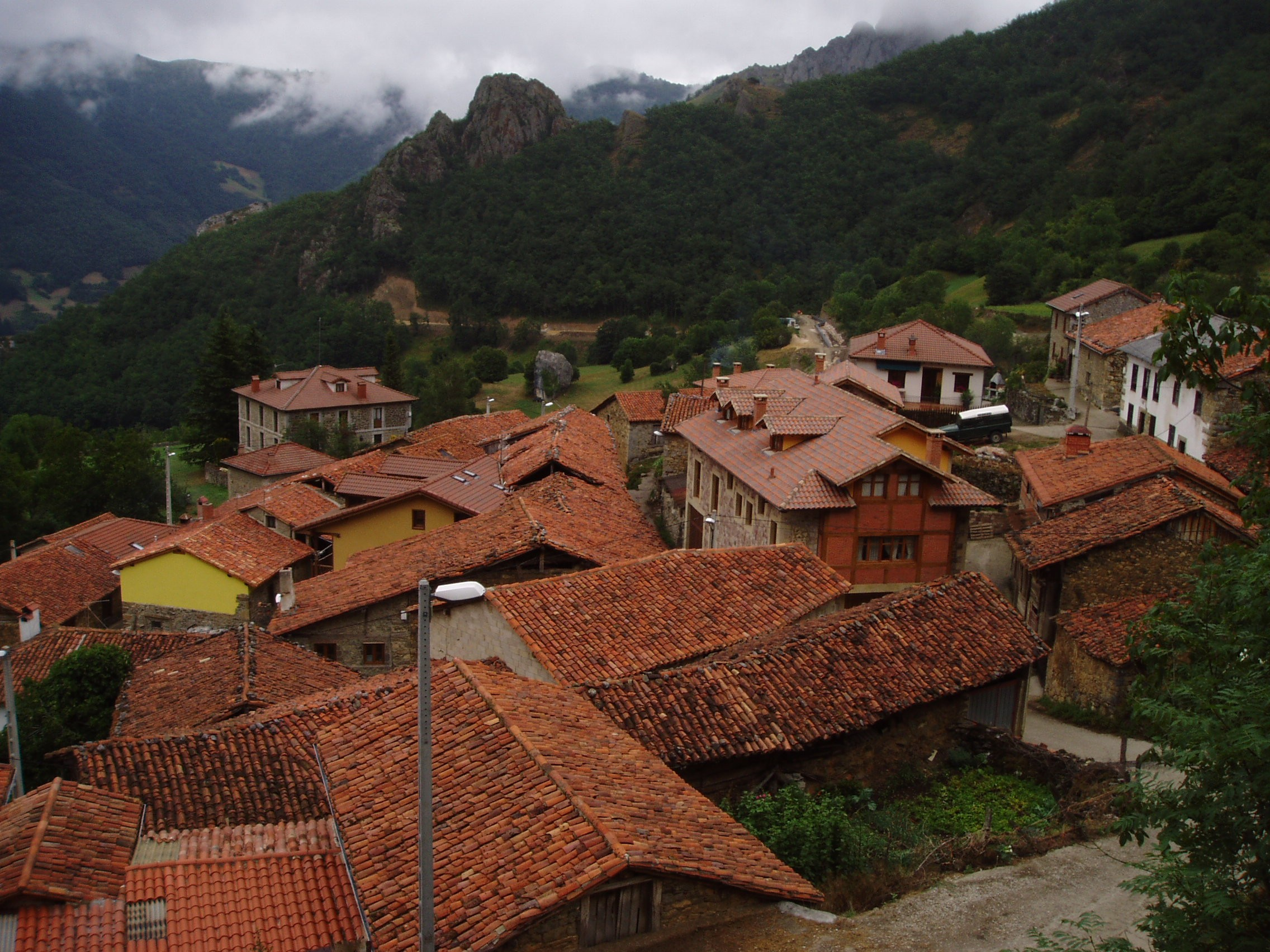 Cucayo. Liébana. Cantabria. España